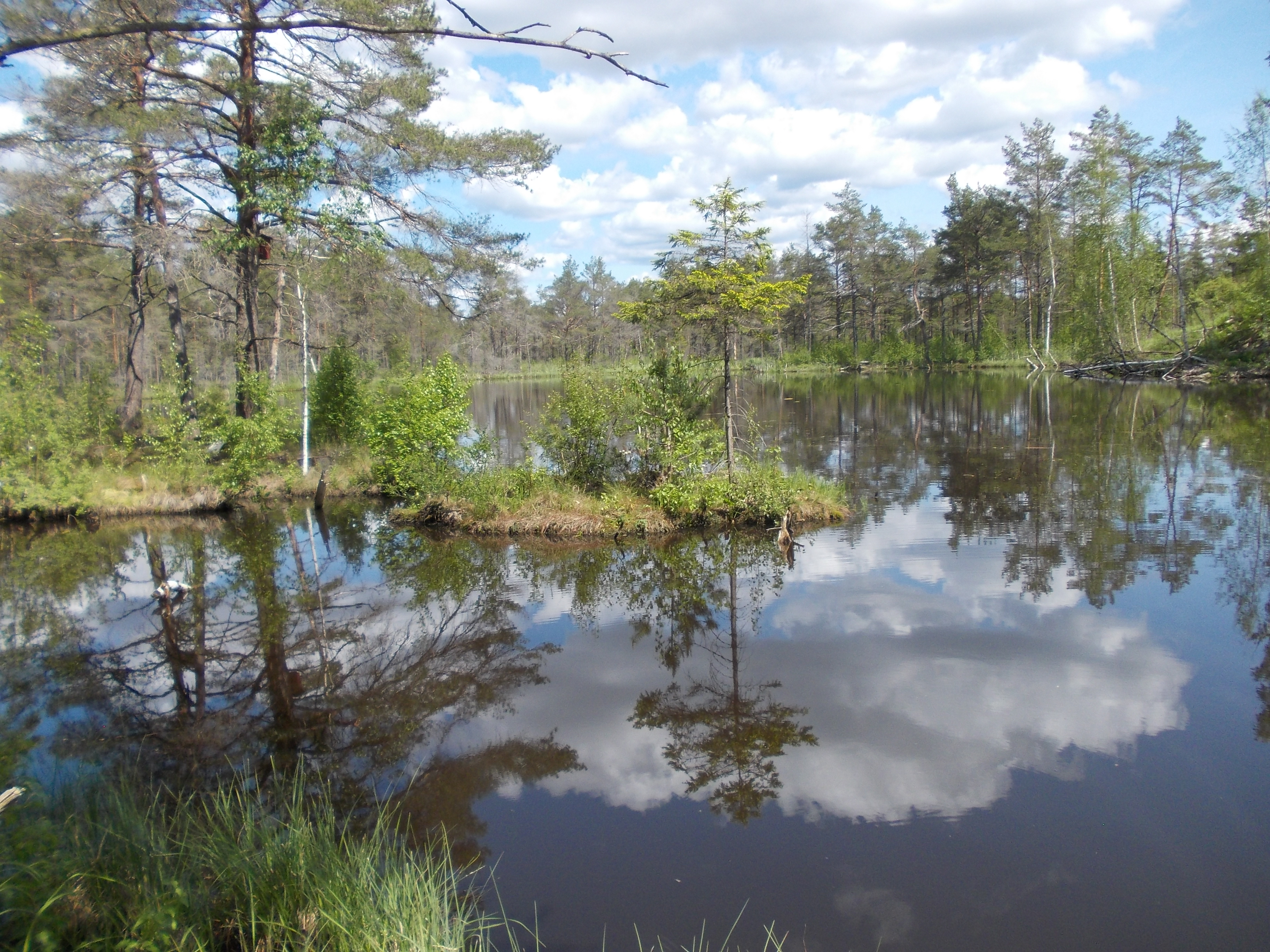 Knuthöjdsmossen är ett naturreservat i Hällefors kommun, Örebro län.